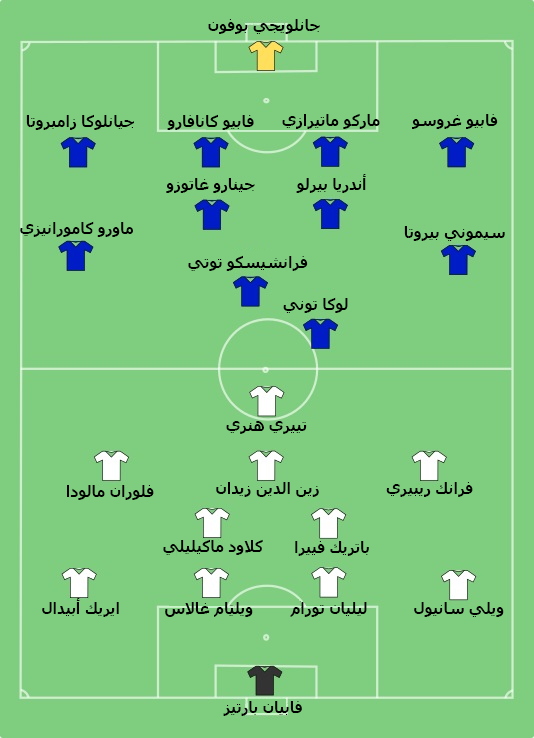 صورة توضح تشكيلة فريق فرنسا و إطاليا في المبارات النهائية لكأس العالم 2006